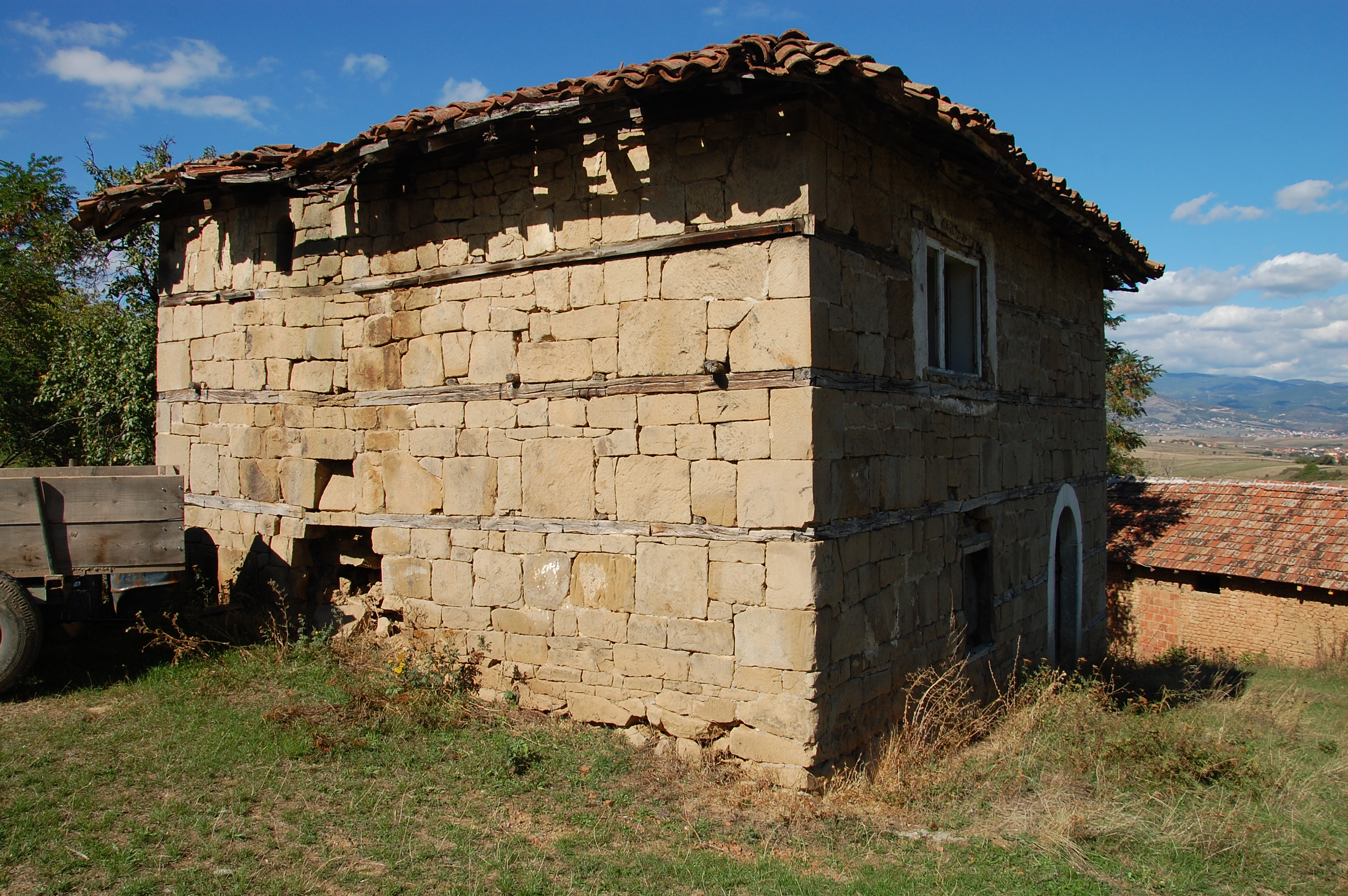 Kulla e Kadri Hysenit. - Ashlan Vushtrri, District of Mitrovica